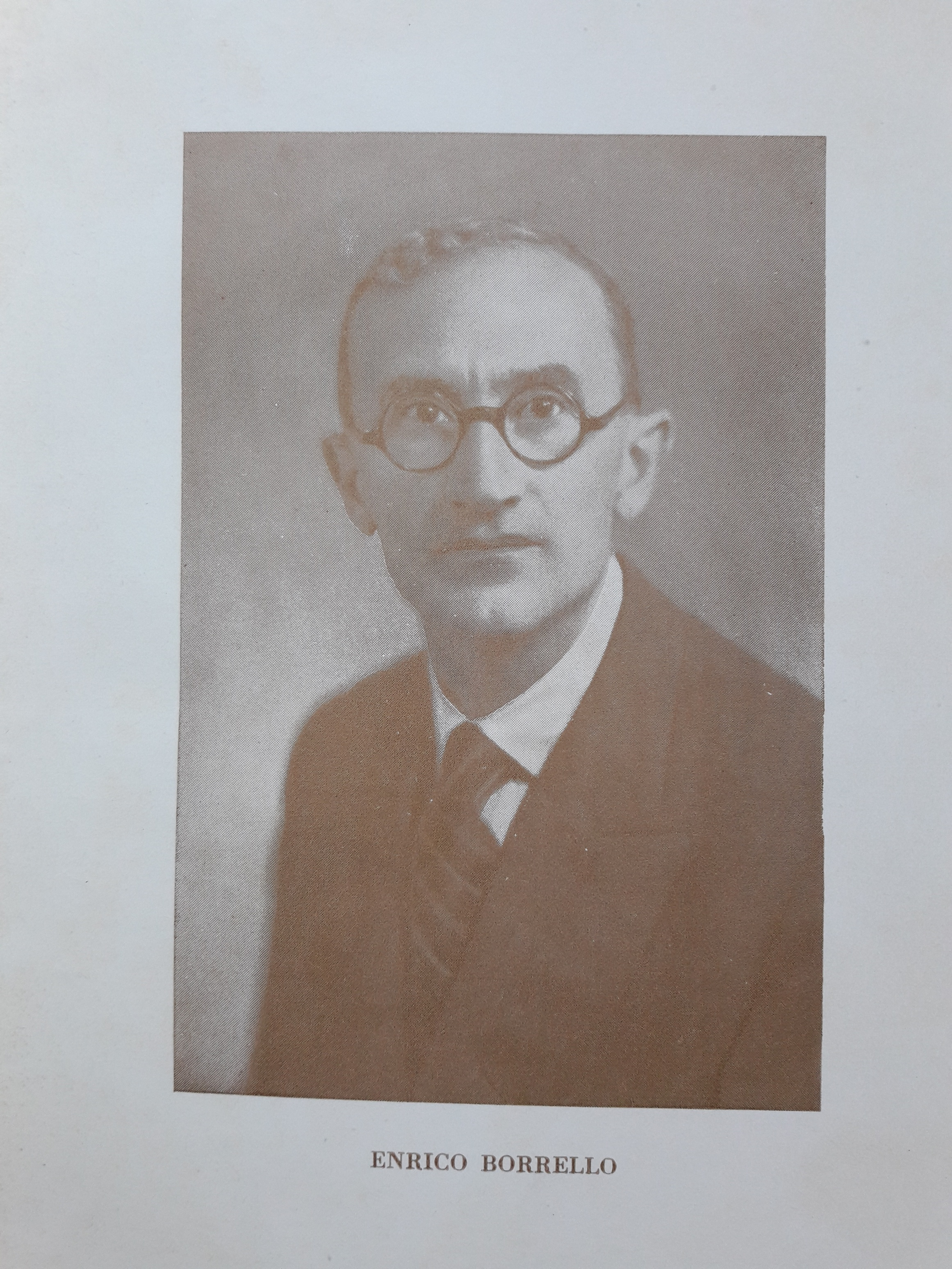 Enrico Borrello foto contenuta in "Vecchie e nuove"